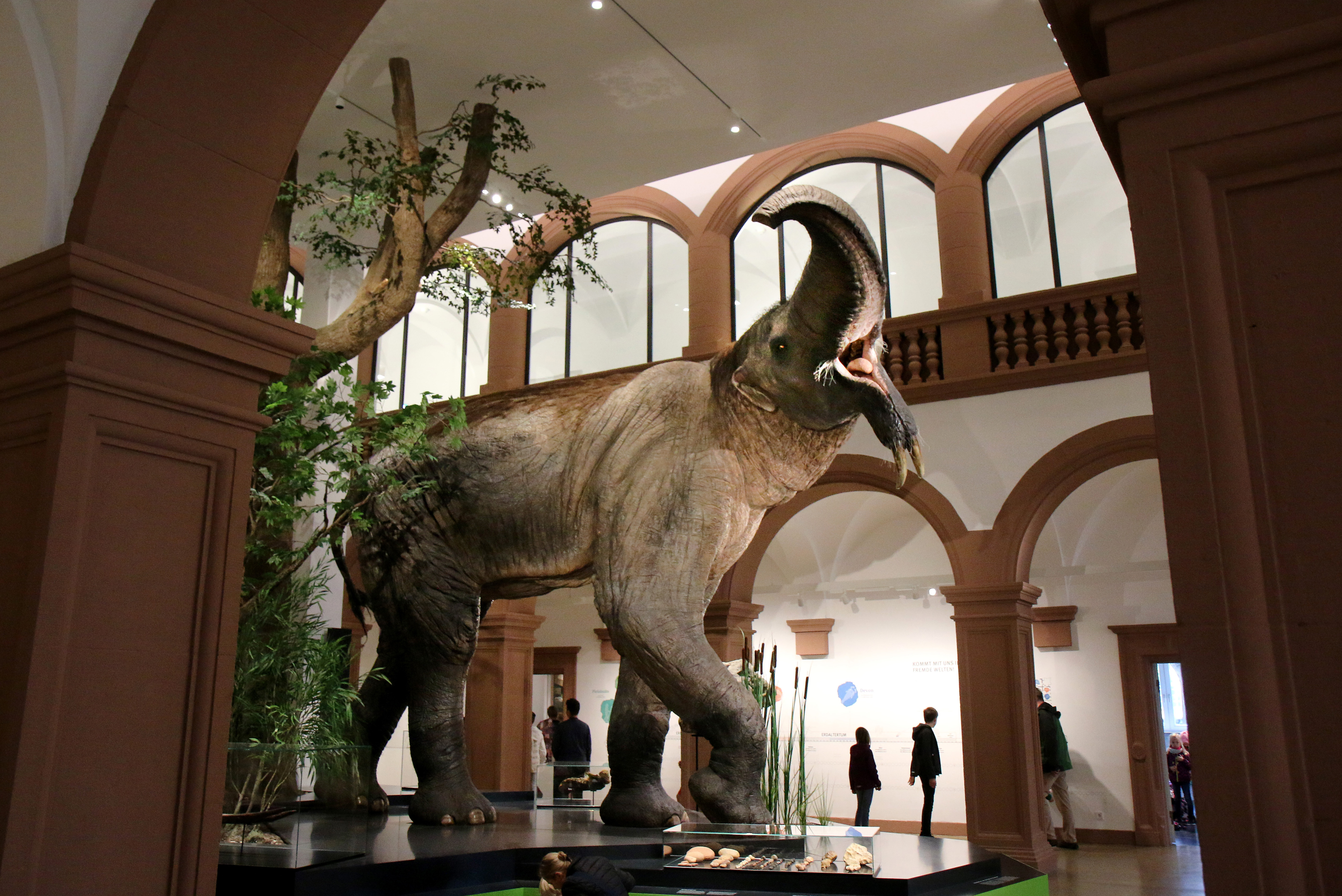 Im Eingangsbereich das Deinotherium Giganteum ("riesiges Schreckenstier"), das vor 3,5 Millionen Jahren das Rheintal bevölkerte.